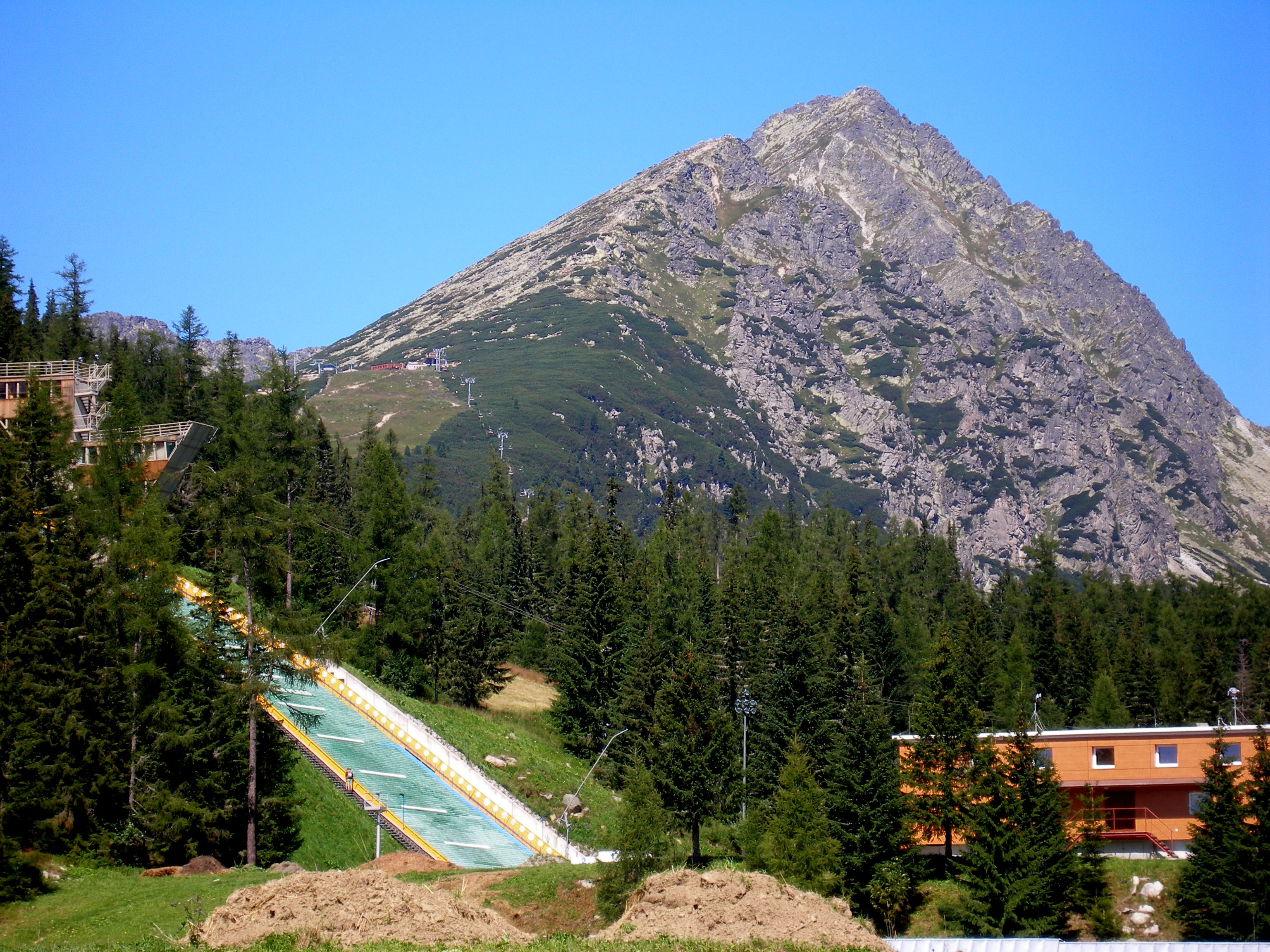 Tatranská osada Štrbské Pleso a jej okolie. Obec Štrba